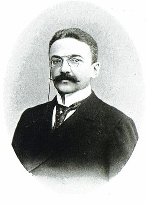 Директор Департамента полиции Алексей Александрович Лопухин (1864-1928)